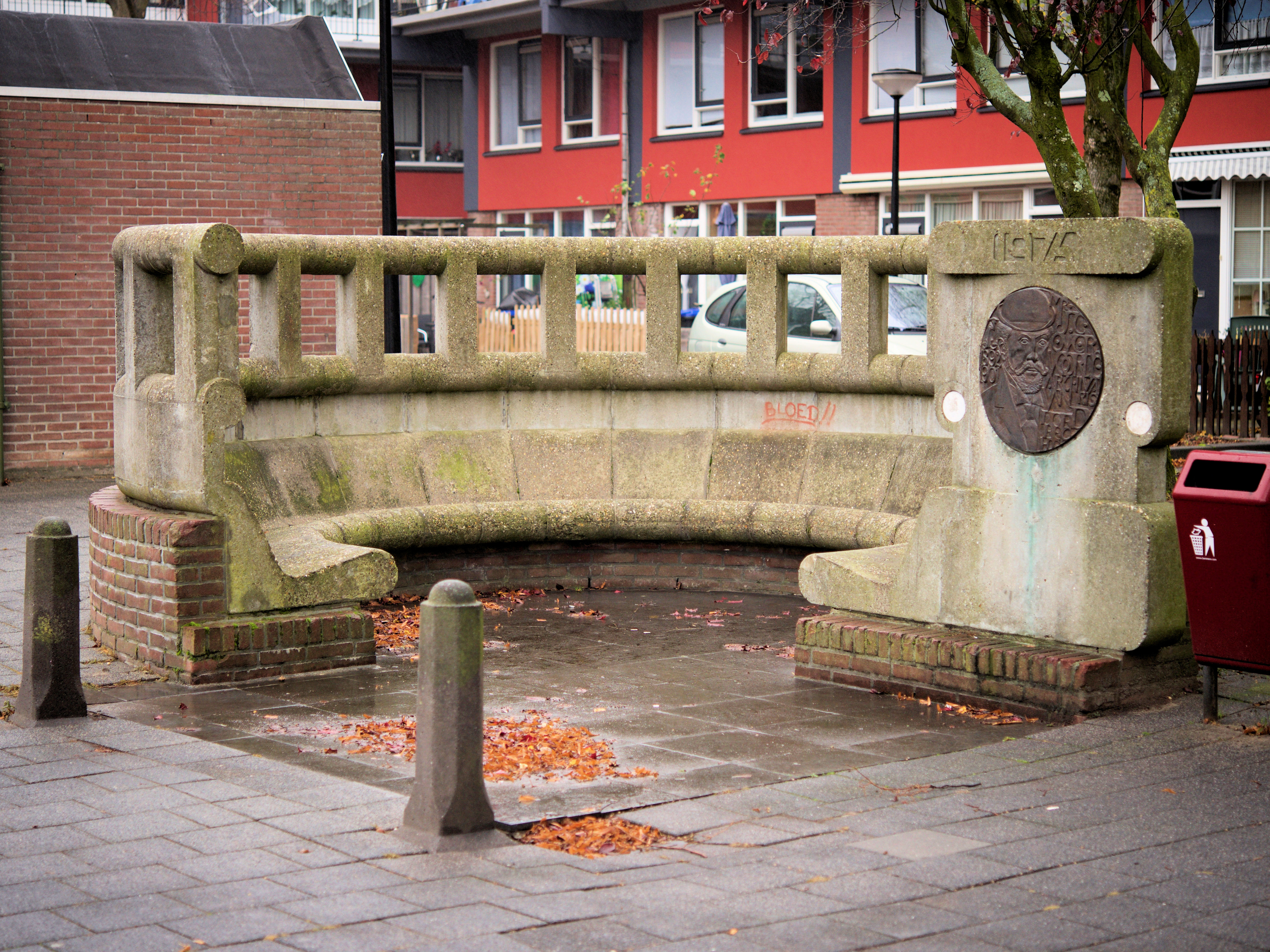 De Overvoordebank tegenover de ingang van het voormalig Gemeentearchief aan het Stek in Dordrecht. De bank werd ontworpen door prof.ir. C. Weeber. De plaquette is van de hand van Christien Nijland en toont in reliëf mr. Jacob Cornelis Overvoorde, archivaris van Dordrecht in de periode 1892 -1901. Het monument werd geplaatst, het jaar dat de nieuwbouw van het archiefgebouw gereedkwam.